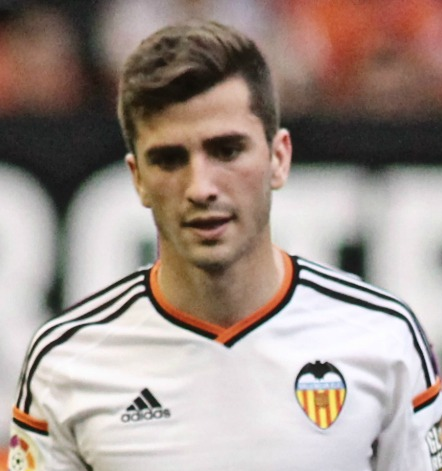 Jose Gaya playing for Valencia CF in 2015 Fotografía: Carla Cortés / @noaasoka